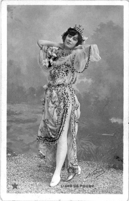 Liane de Pougy, franz. Tänzerin, Aufnahme von ca. 1902